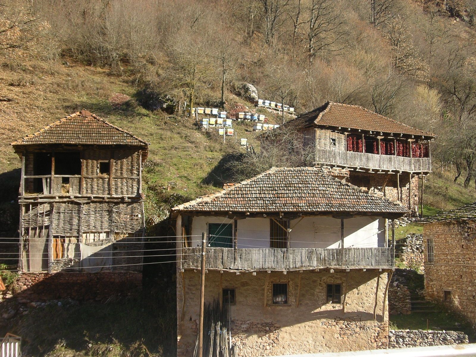 Стари куќи во Железнец, Демир Хисар